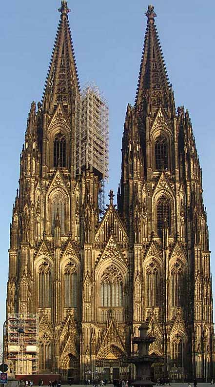 Kölner Dom